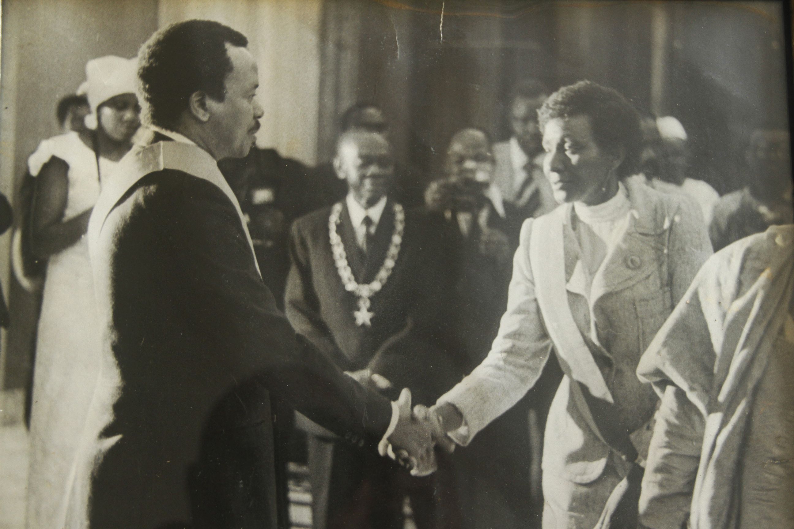 Présentation des voeux au président Paul Biya en 1982